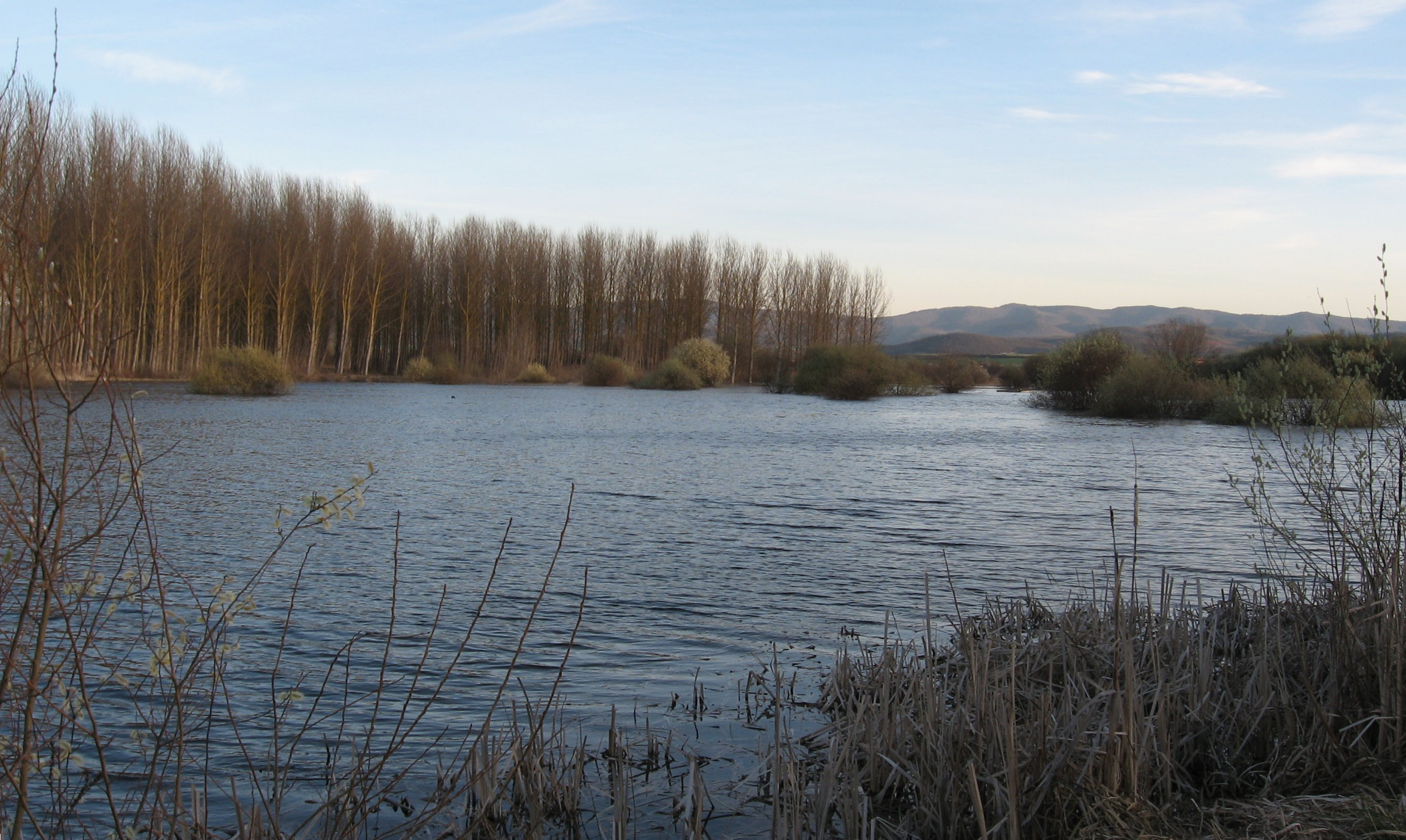 Desc: Balsas de Salburua